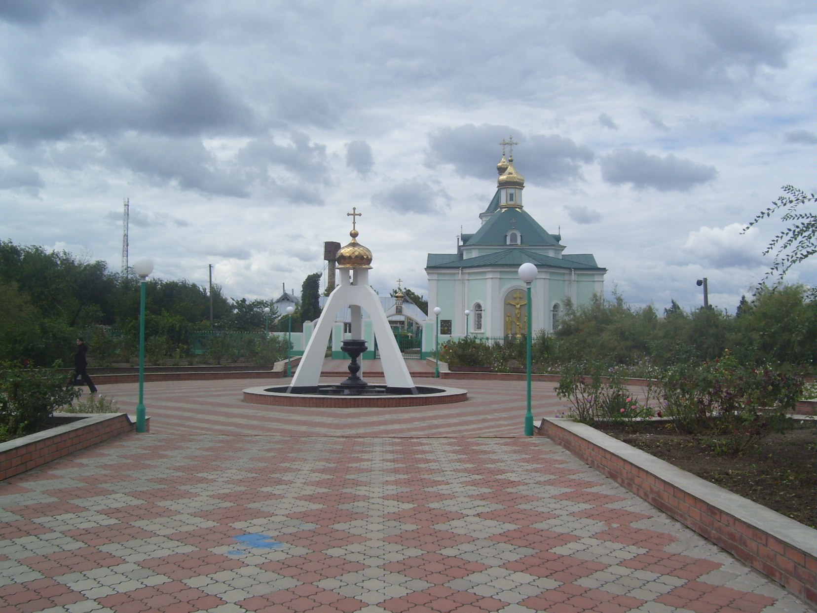 Церква Троїцька, с. Зоря